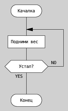 ДРАКОН-схема силового упражнения.